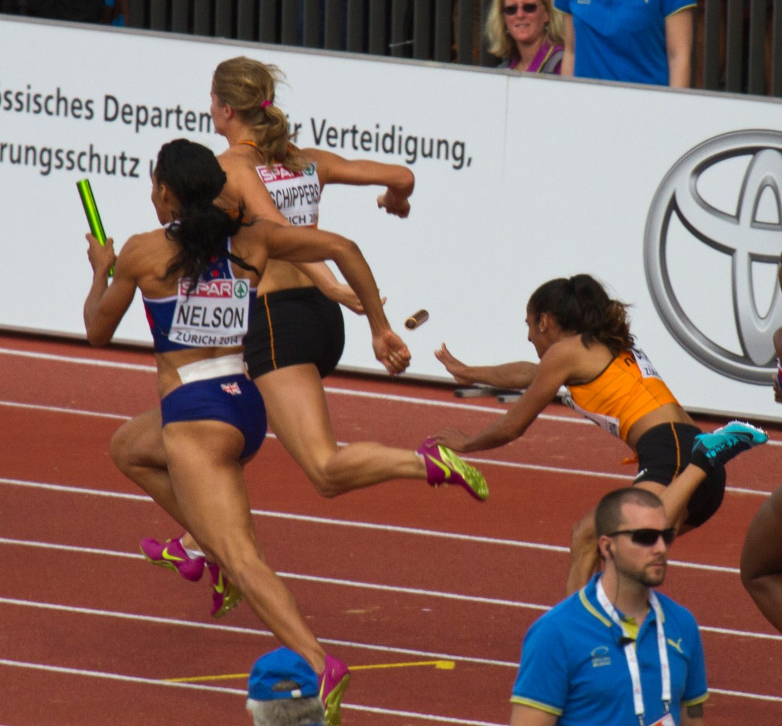 990780 aflossingnederland4x100finale